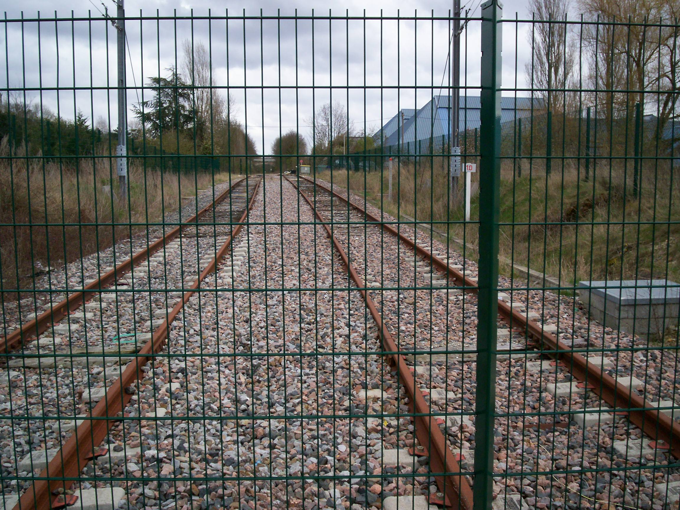 Vue de la Grande Ceinture vers Saint-Cyr